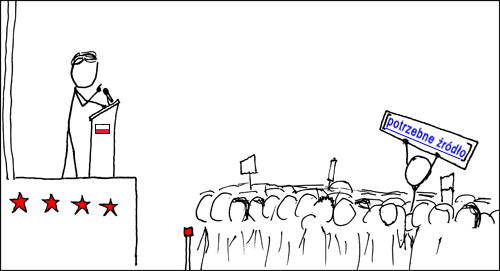 Polskie tłumaczenie komiksu